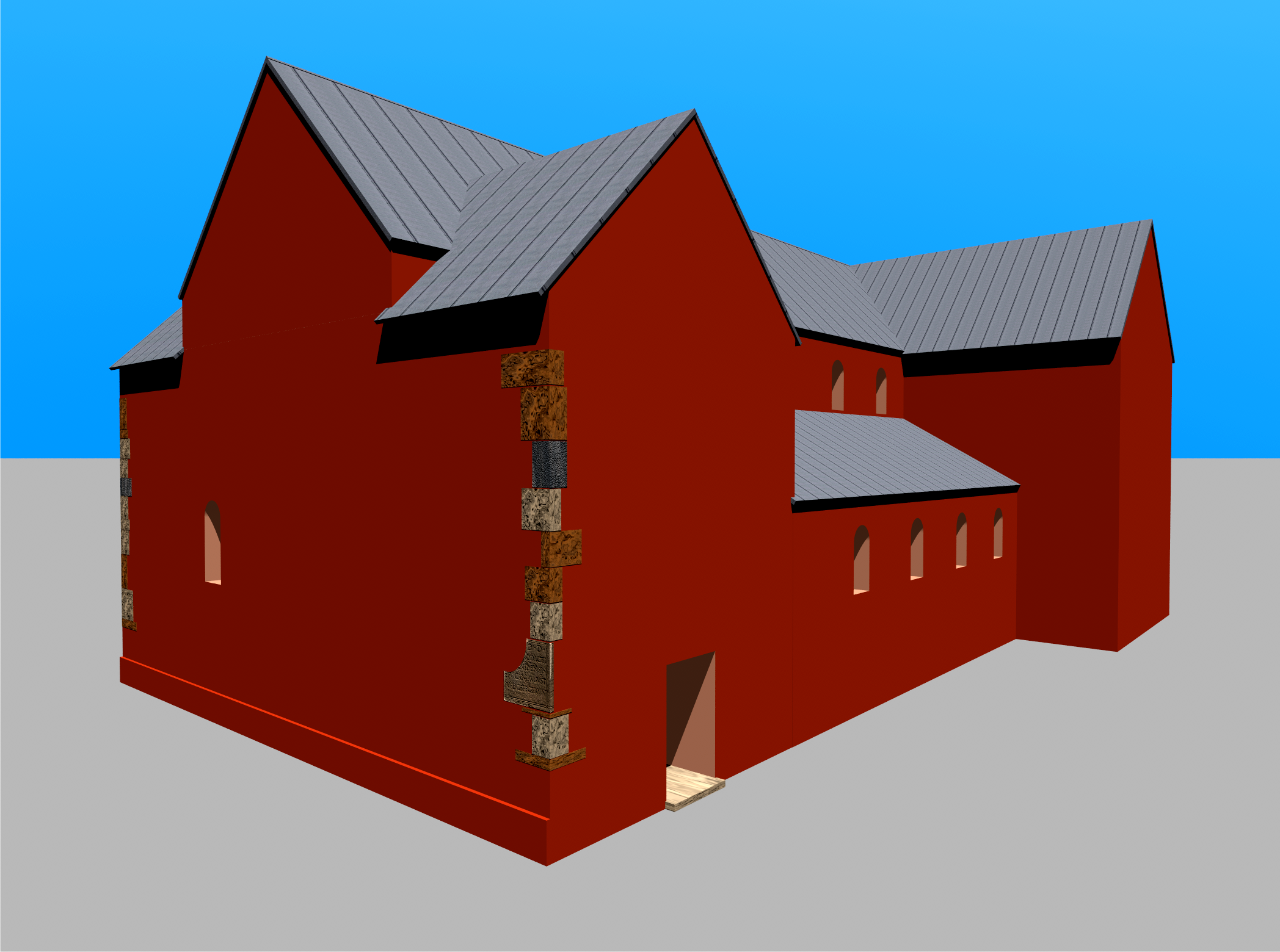 Laurentiuskirche Trebur in ottonischem Bauzustand (nach 1000) ohne Turm. Erstellt nach Angaben des IBD Marburg